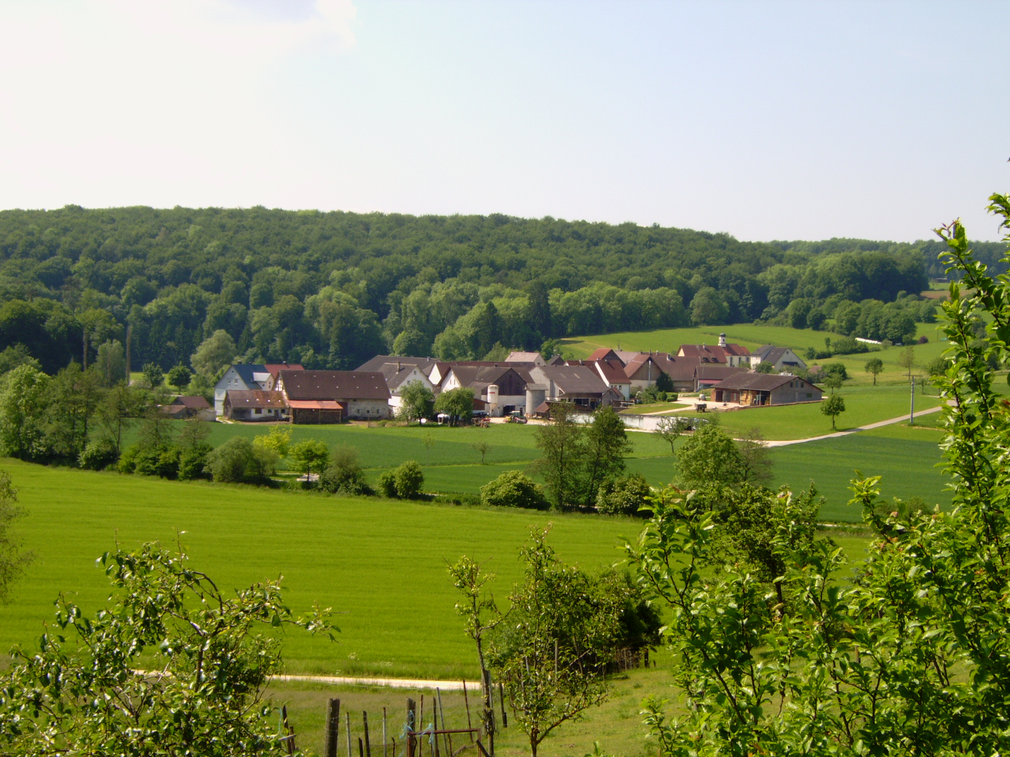 Ansicht 2005 von D 89584 Unterwilzingen, Teil von Erbstetten in der Gemeinde Ehingen (Donau)